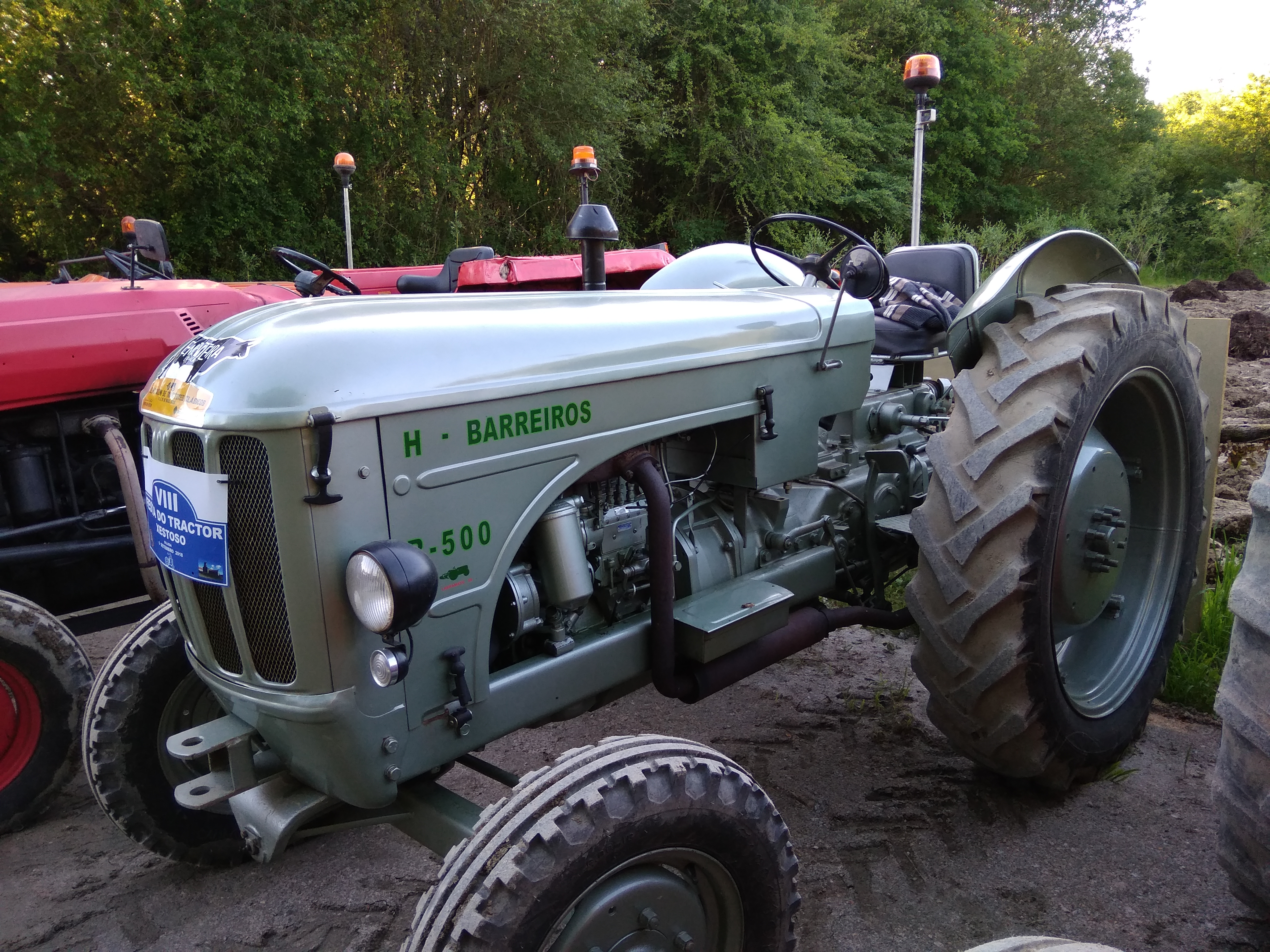 Fotografía realizada en XII Sementeira e Música, na parroquia de San Miguel de Corzáns (Salvaterra de Miño, Pontevedra)